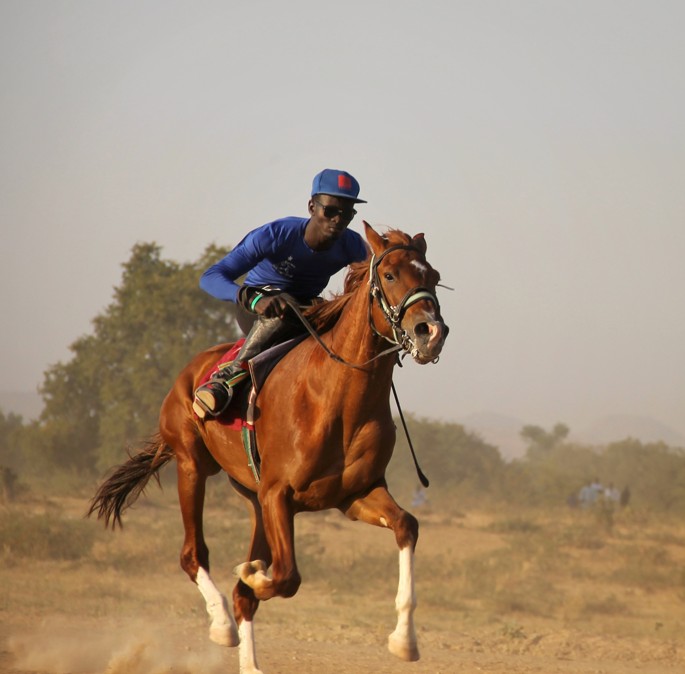 Cavalier à Gashiga dans le nord Cameroun This is an image with the theme "Africa on the Move or Transport" from: Cameroon